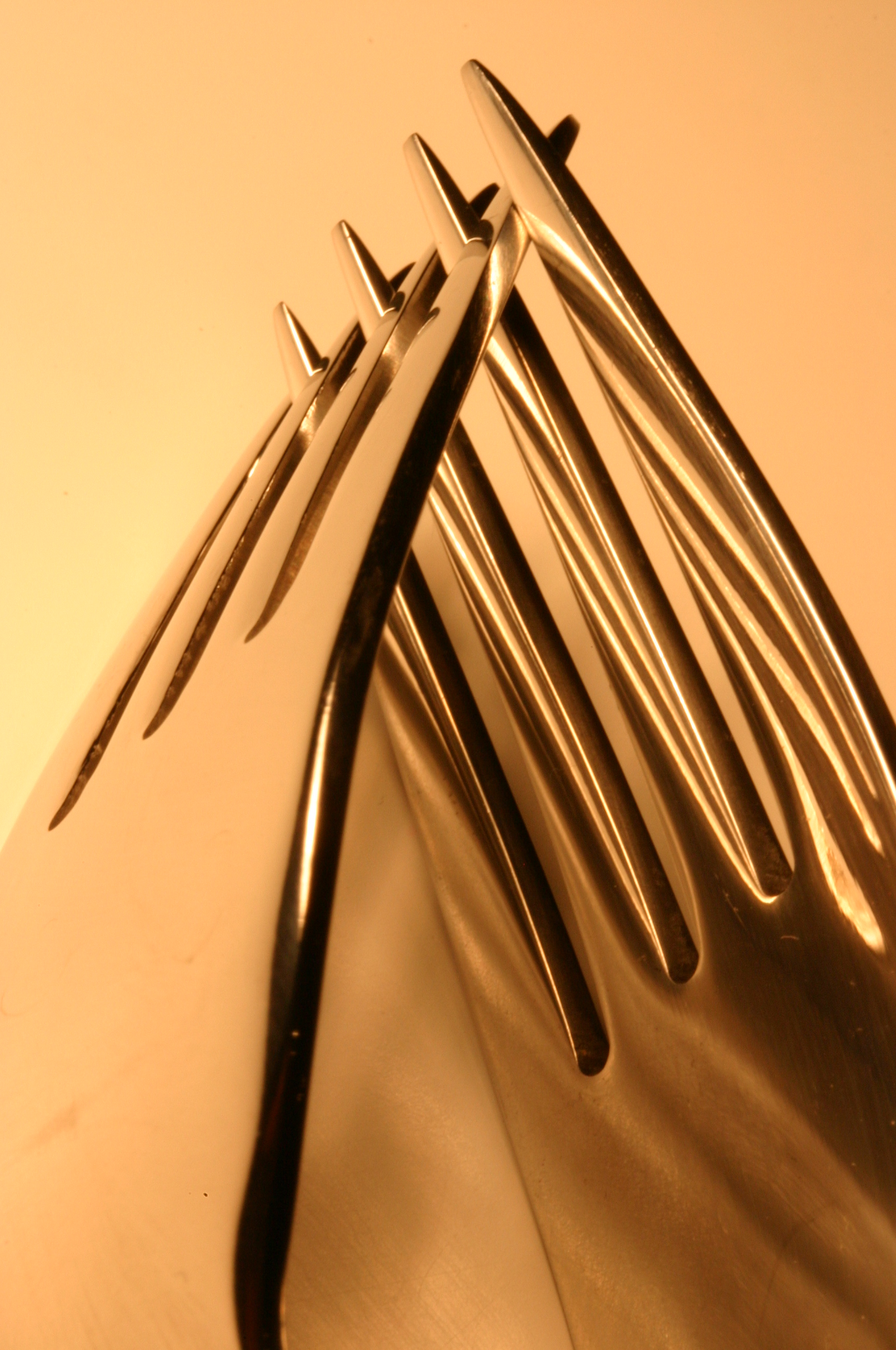 Forks